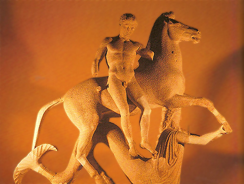 Statua sinistra dal gruppo dei Dioscuri proveniente da Locri Epizephiri, custodito al Museo Nazionale della Magna Grecia di Reggio Calabria.